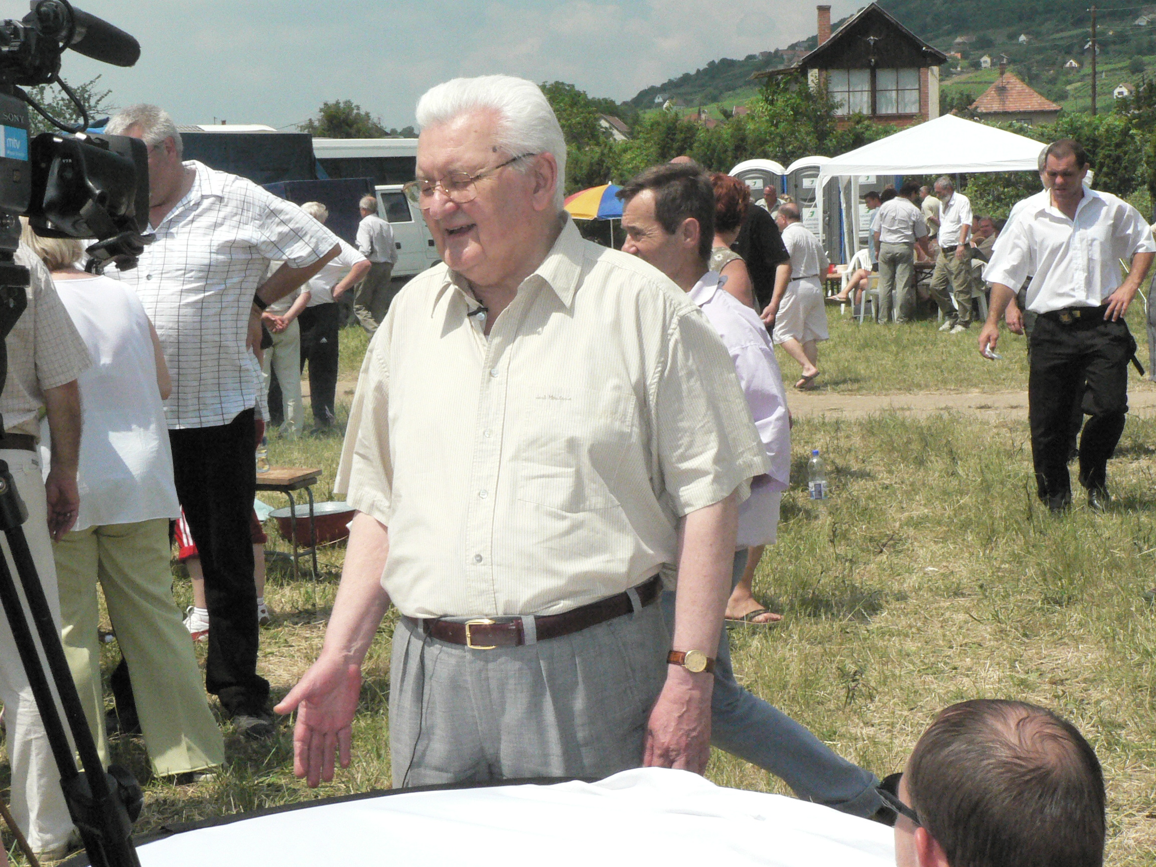 A Magyar Demokrata Fórum 2006 június 24 -én Somló hegyen tartotta összejövetelét. 15 évvel ezelőtt Antall József kormányfő itt jelentette be az orosz csapatok kivonását Magyarországról. A kép korábban megjelent a Metapolisz 2 DVD -n (ISBN: 963-06-0412-4).